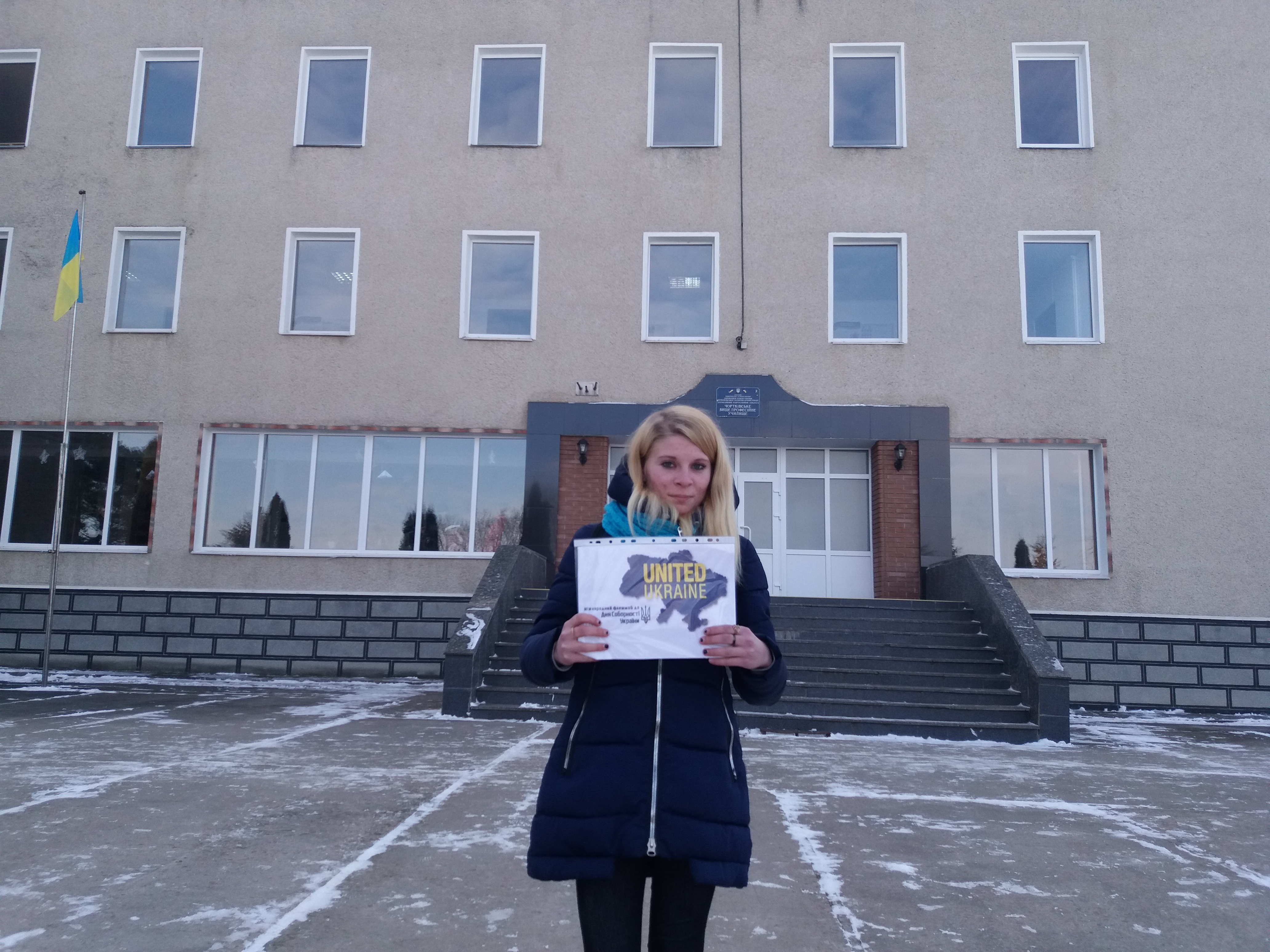 ДНЗ "Чортківське ВПУ"...